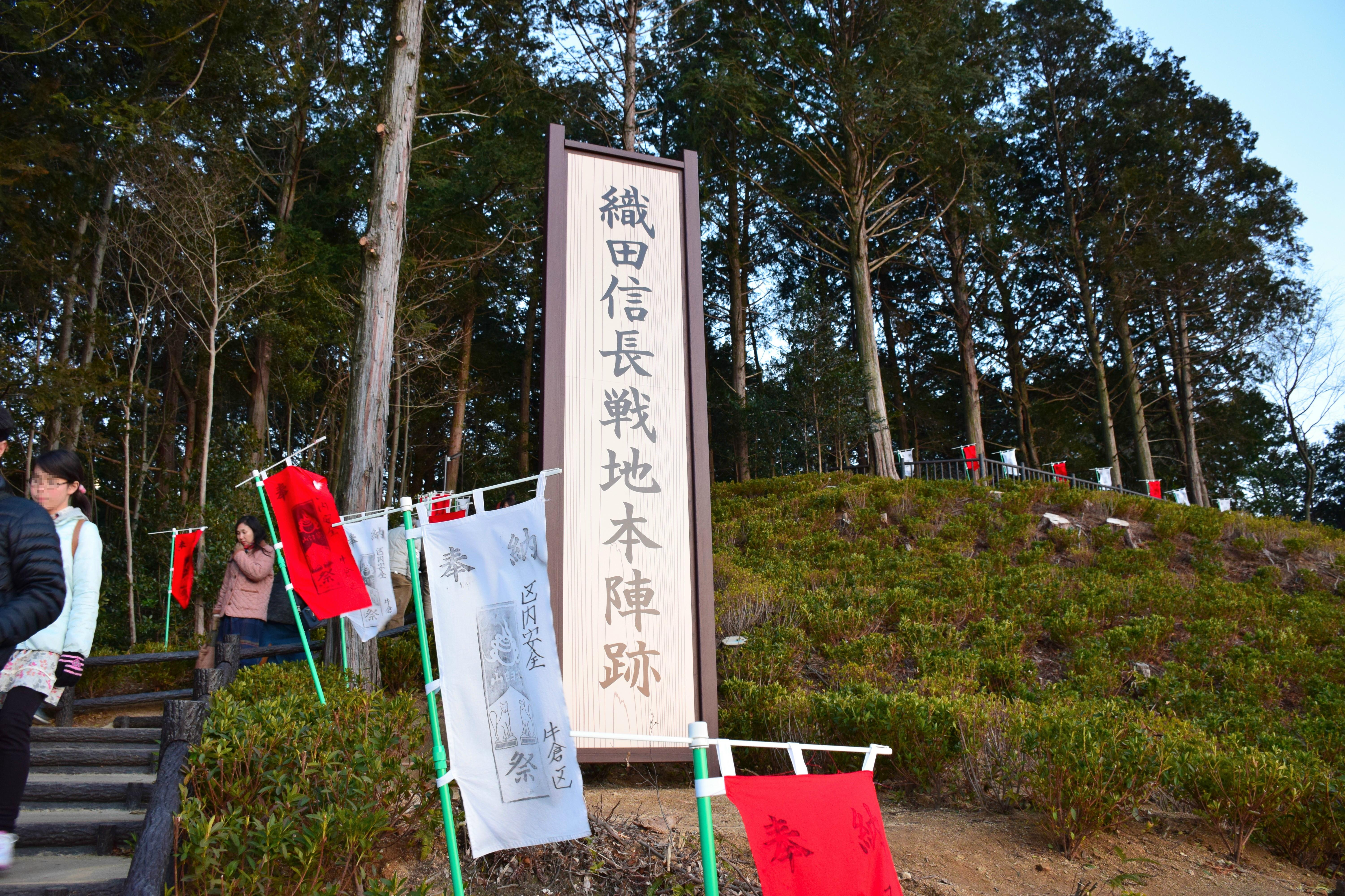 織田信長戦地本陣跡（長篠設楽原パーキングエリア下り）